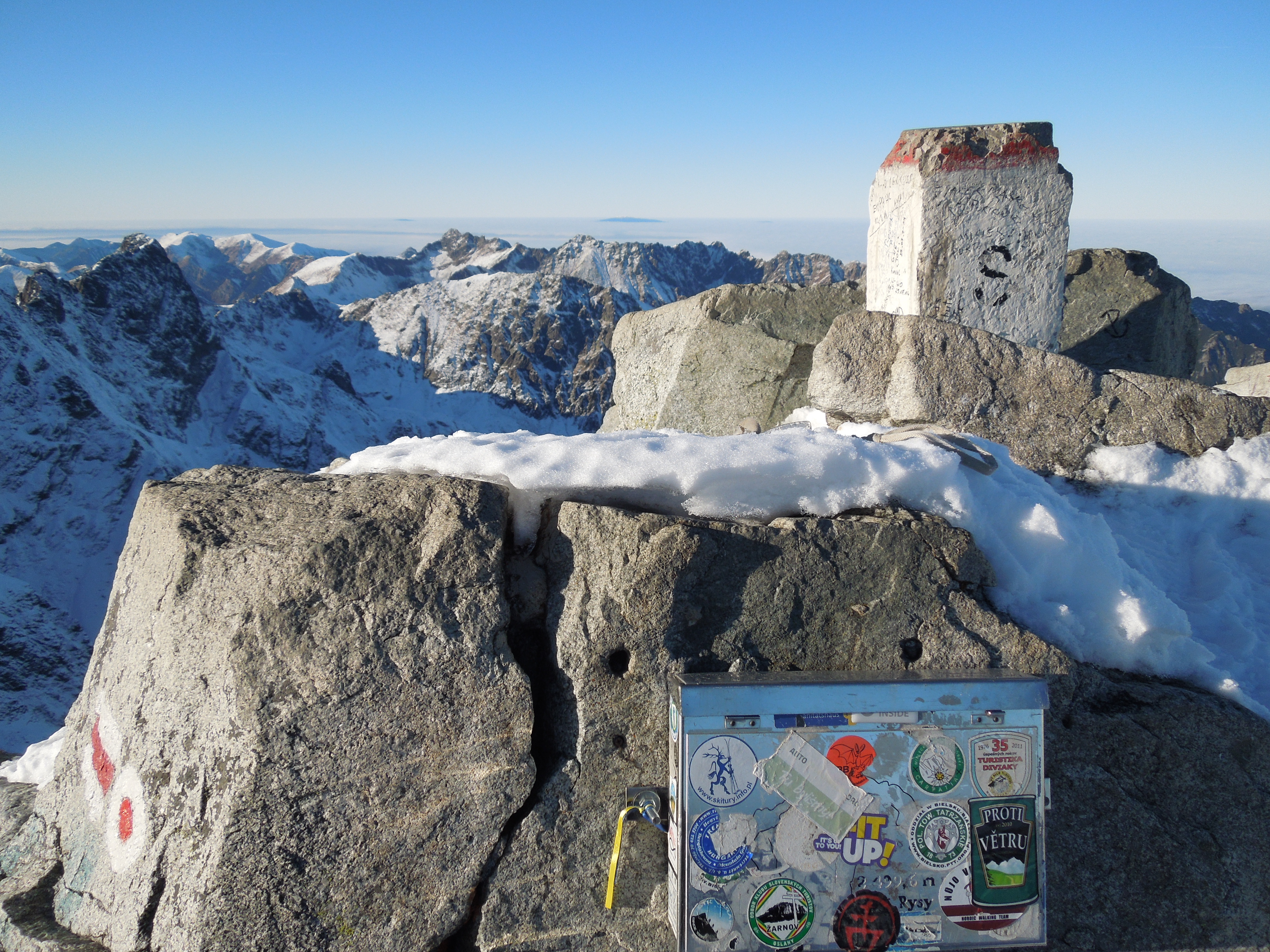 Turisticky prístupný severozápadný vrchol (2 498,7 m n. m.) - najvyšší bod Poľska